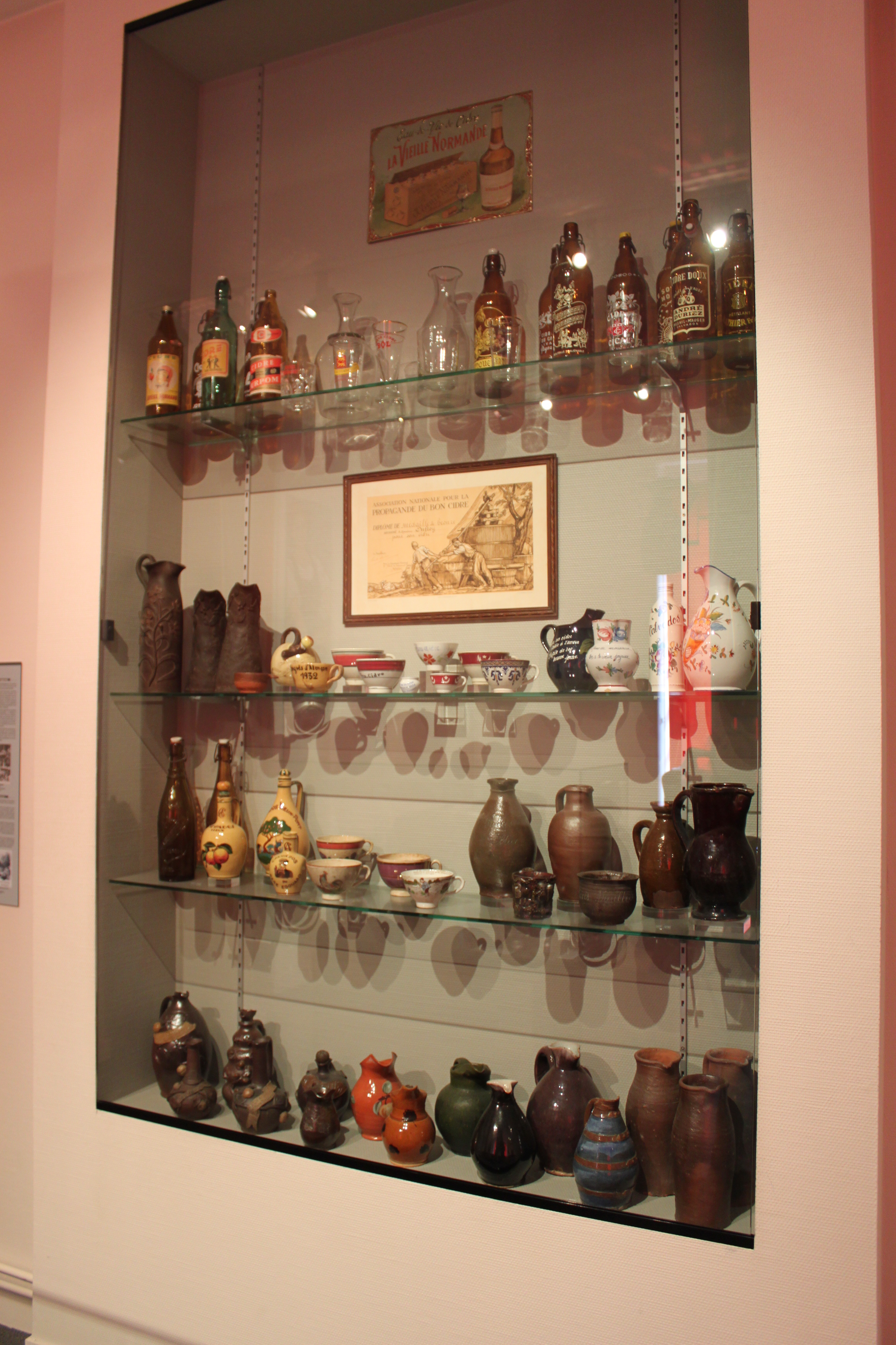 Caen, France